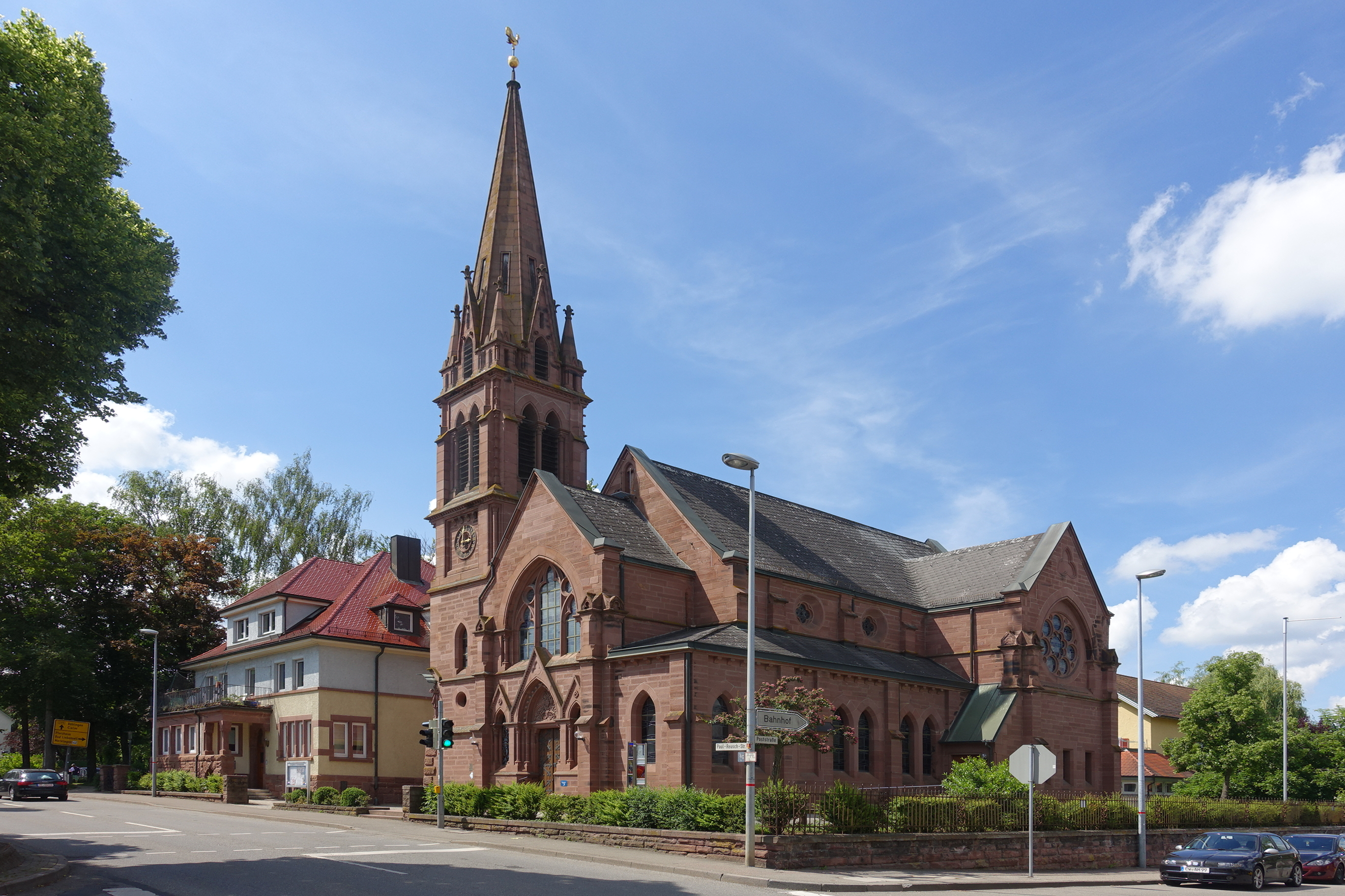 Blick auf die Johannes-Brenz-Kirche